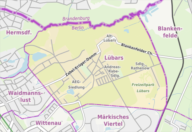 Übersichtskarte der Straßen und Ortslagen in Berlin-Lübars